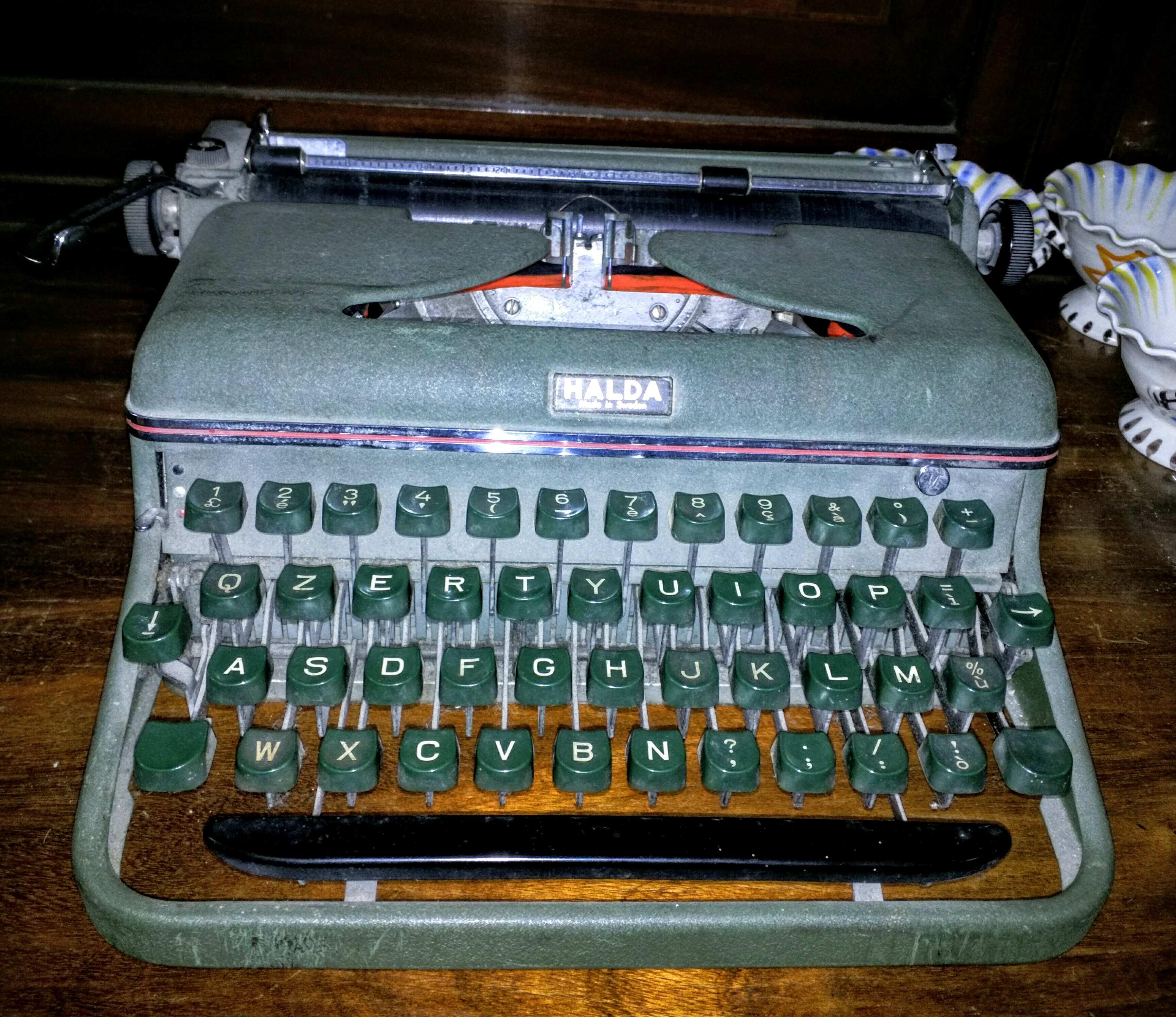 halda